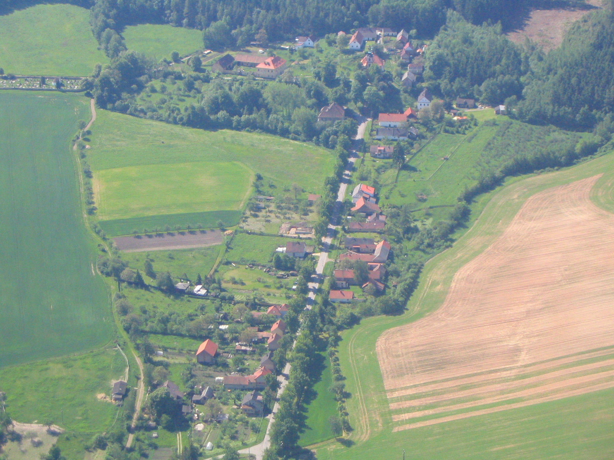 Letecký pohled na jižní část Petrovic u Rakovníka (uprostřed nahoře kostel, vlevo od něj fara a dále vlevo hřbitov)